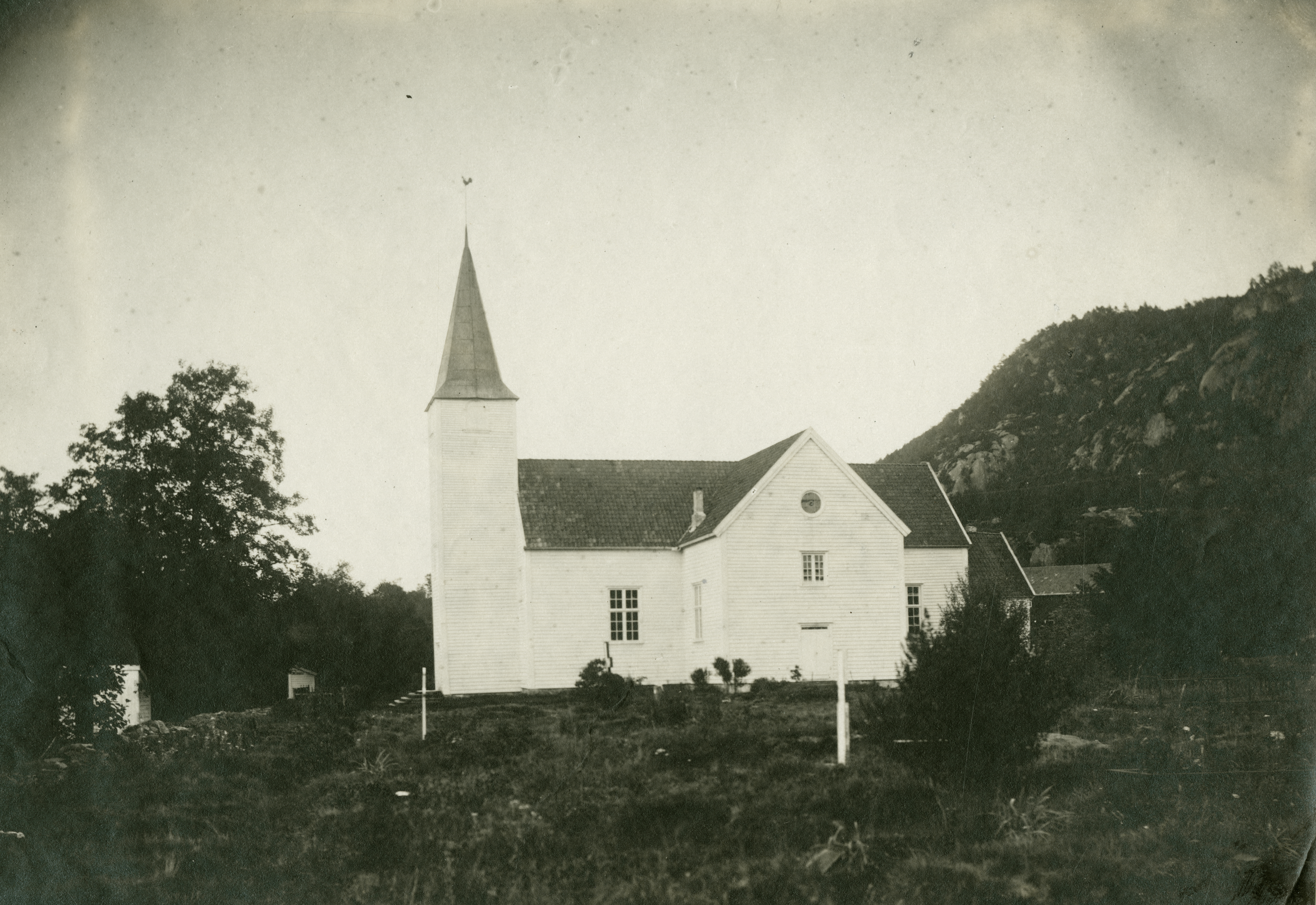 Valle kirke i Valle, Vest-Agder